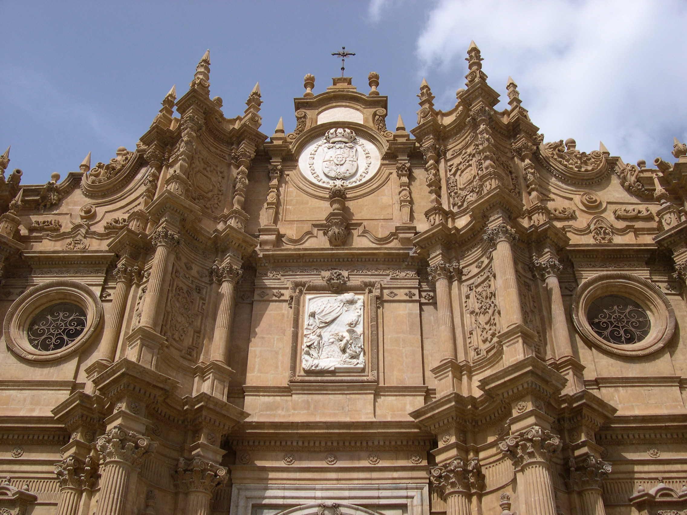 Fachada de la catedral de Guadix (Granada, España)